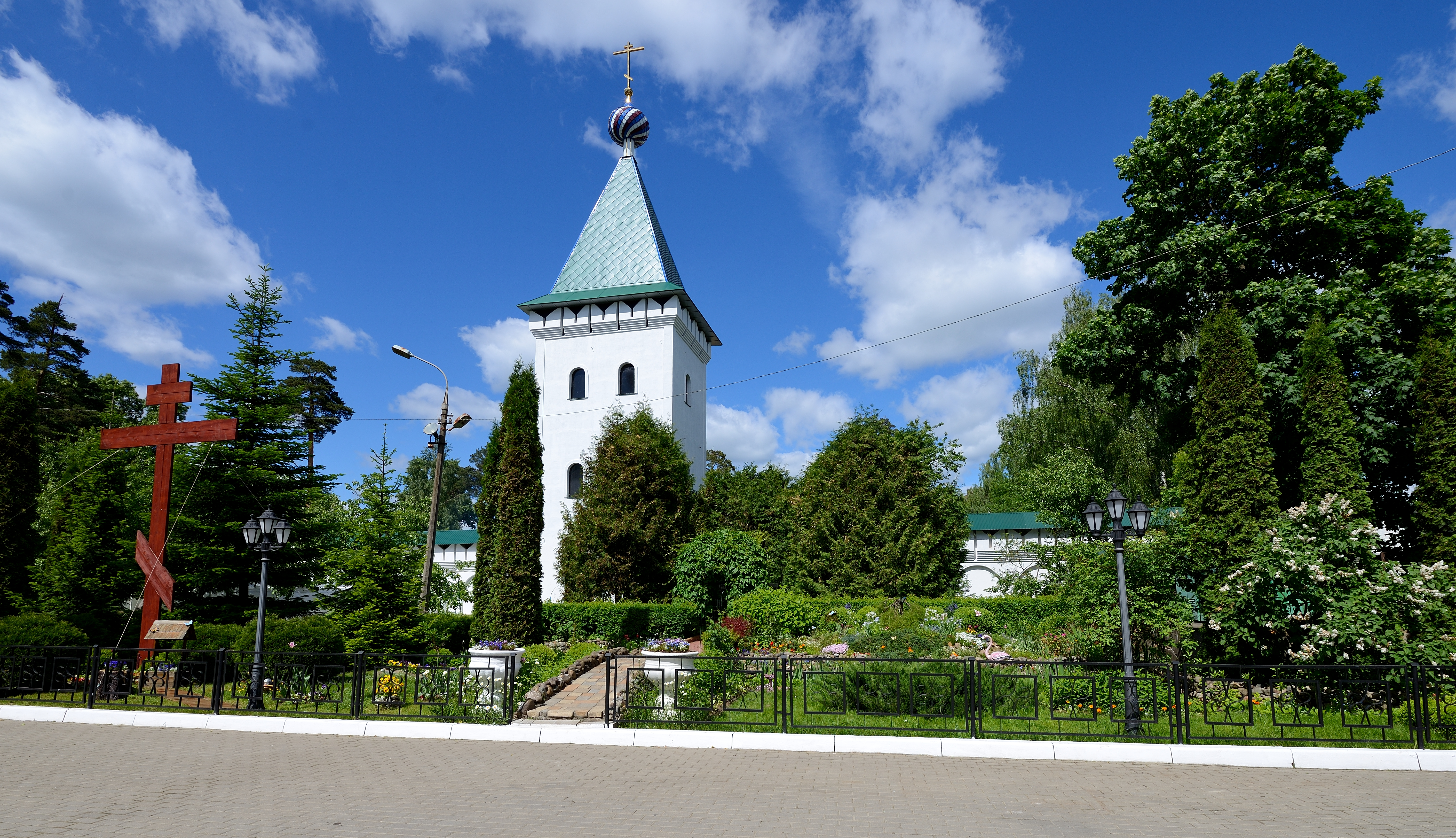 Храм Боголюбской иконы Божией Матери. Пушкино, Московской, Московская епархия, Пушкинское благочиние